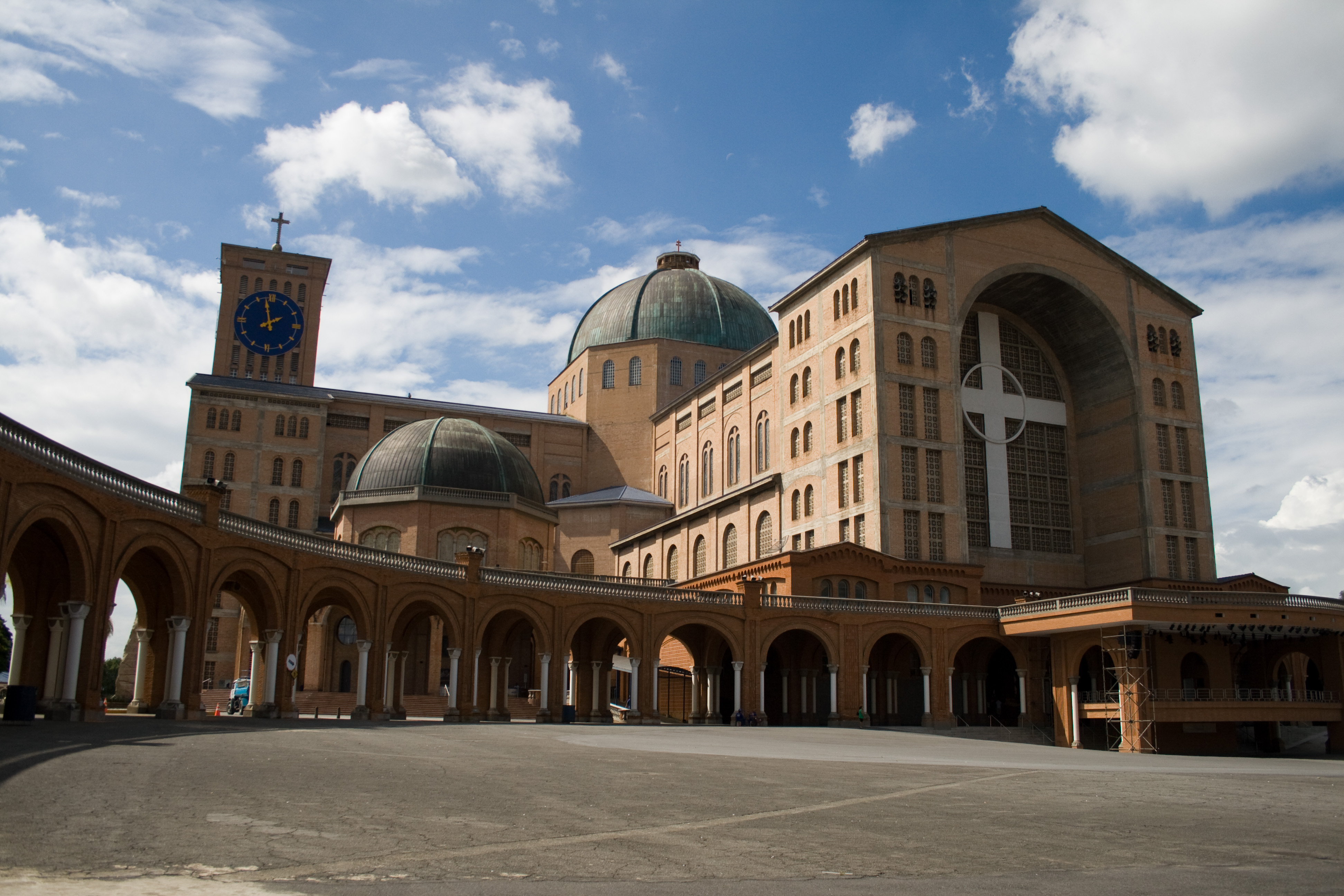 Dia claro no Santuário de Aparecida